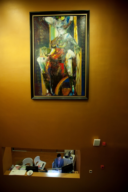 Expo Shanghai